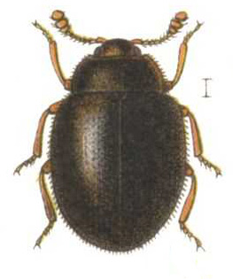 Sphaerosoma pilosum Panz. = Sphaerosoma pilosum (Panzer, 1793)